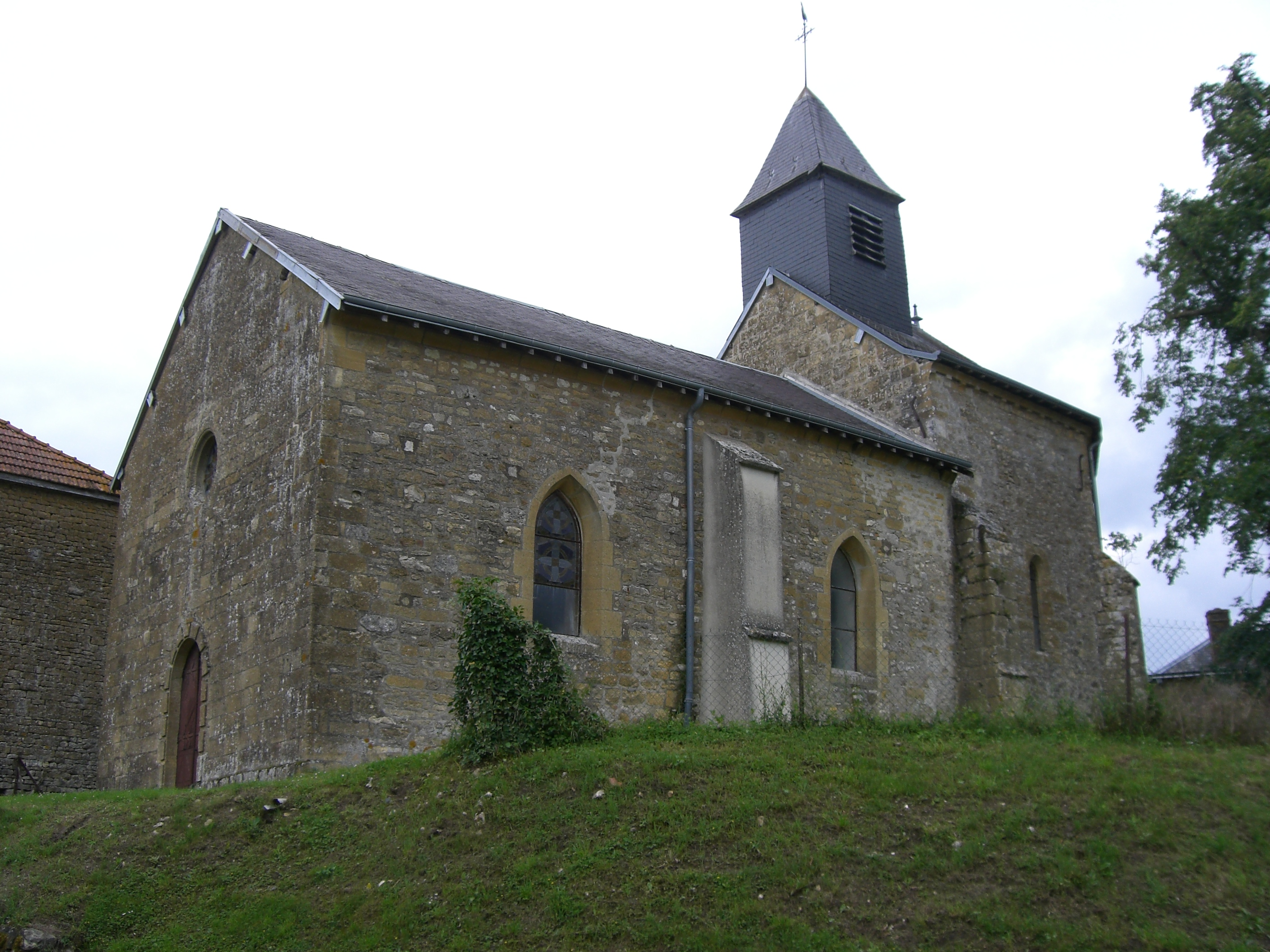 Eglise de Beffu-et-le-Morthomme (Ardennes, France)